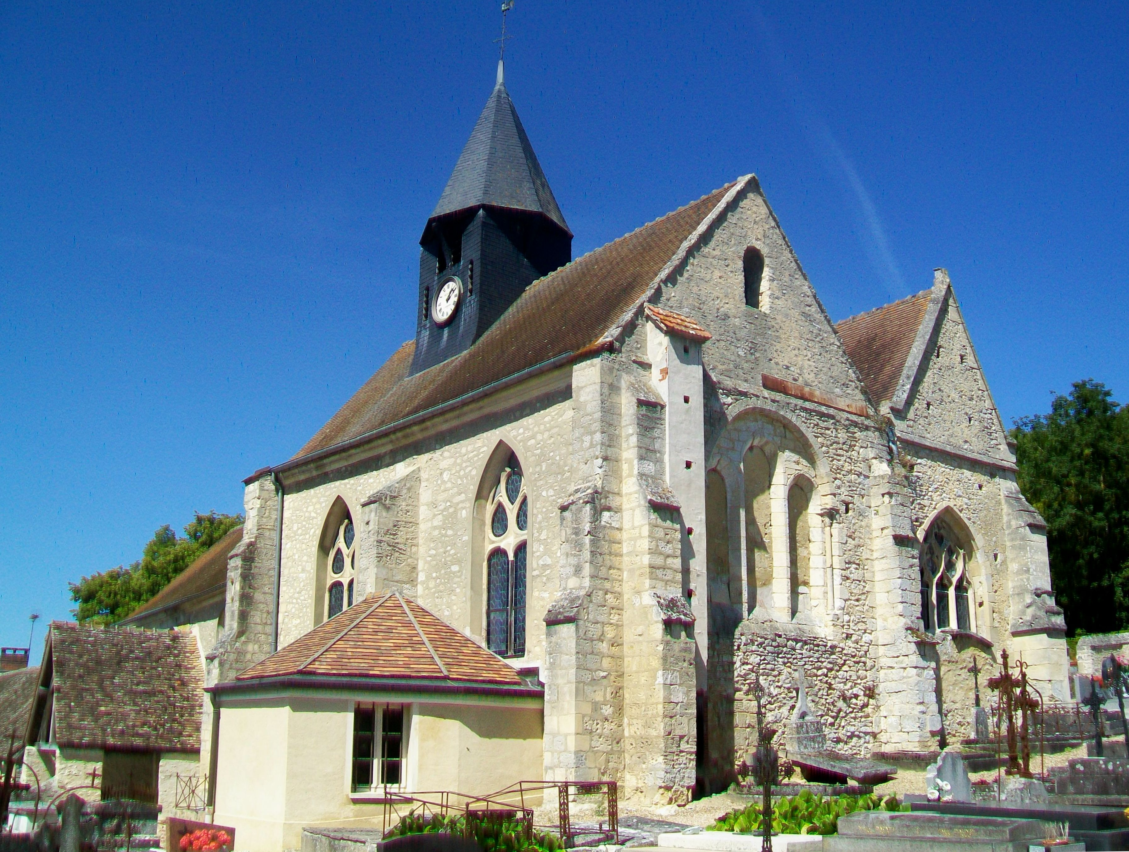 Le chevet et la façade sud.